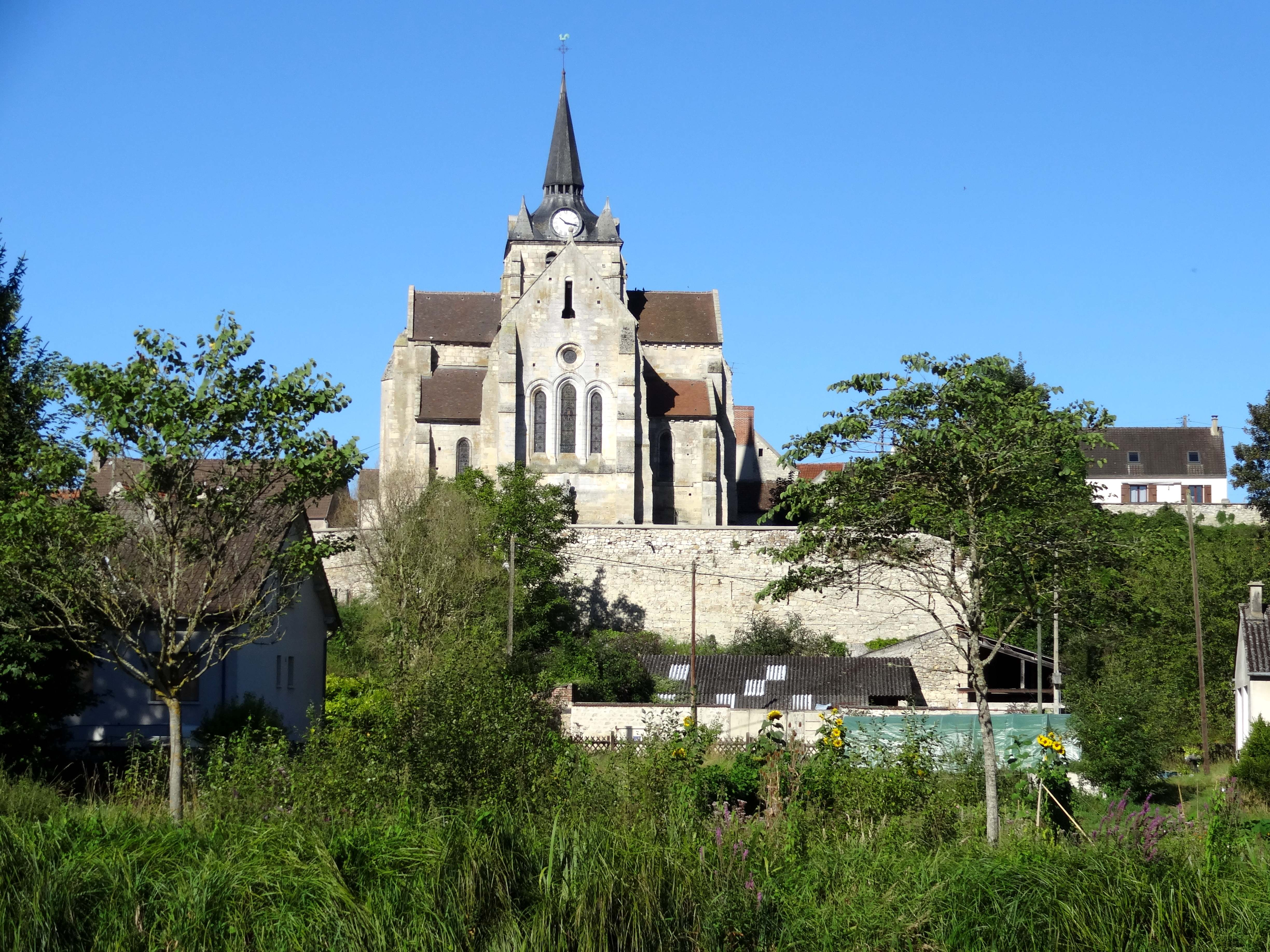 Église Saint-Martin de Mareuil-sur-Ourcq - voir titre.